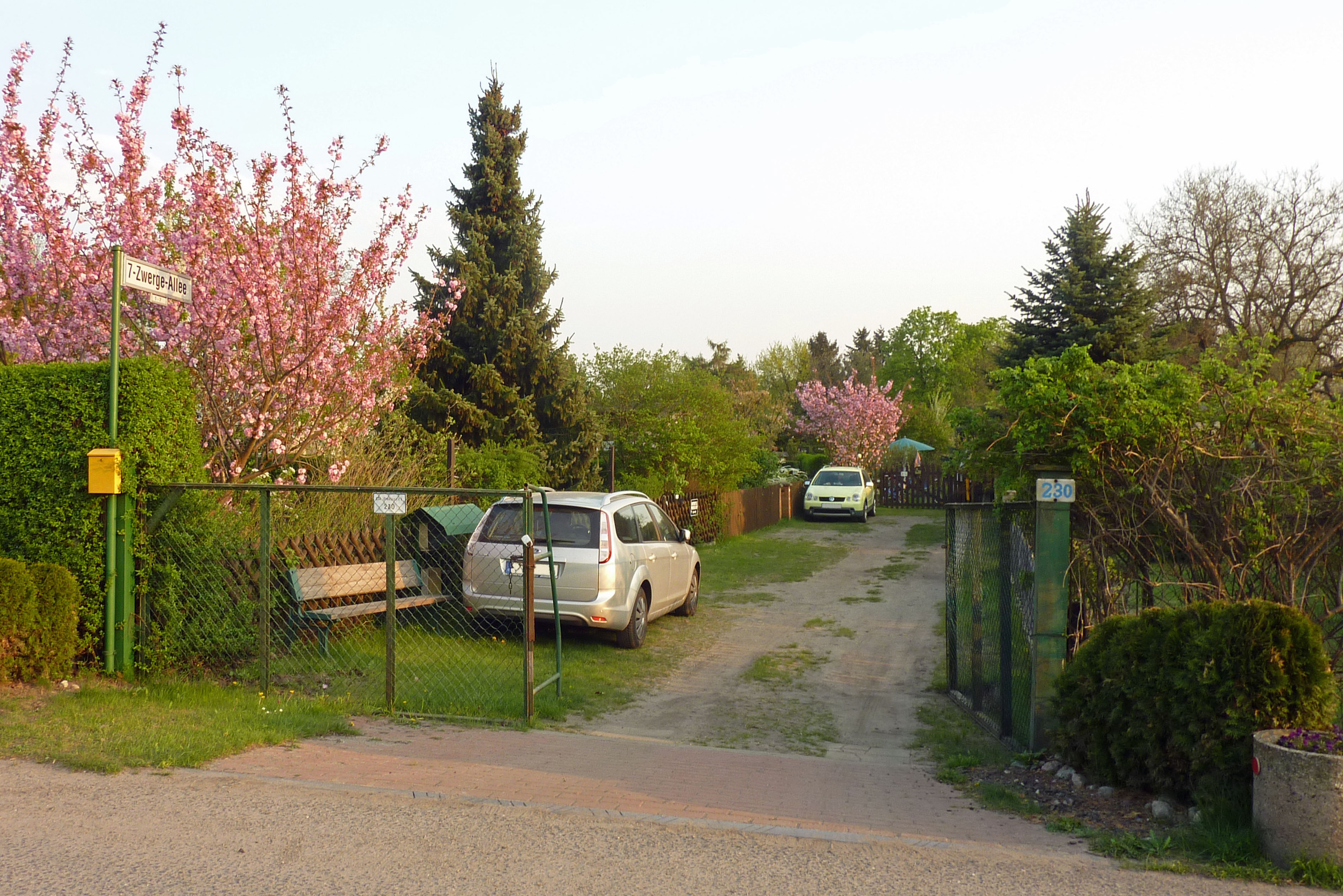 Nichtamtliche 7-Zwerge-Allee (1–7) in Berlin-Karlshorst, kurze Privatstraße in der KGA Rheinstein, südlich an der Wiesengrundstraße.